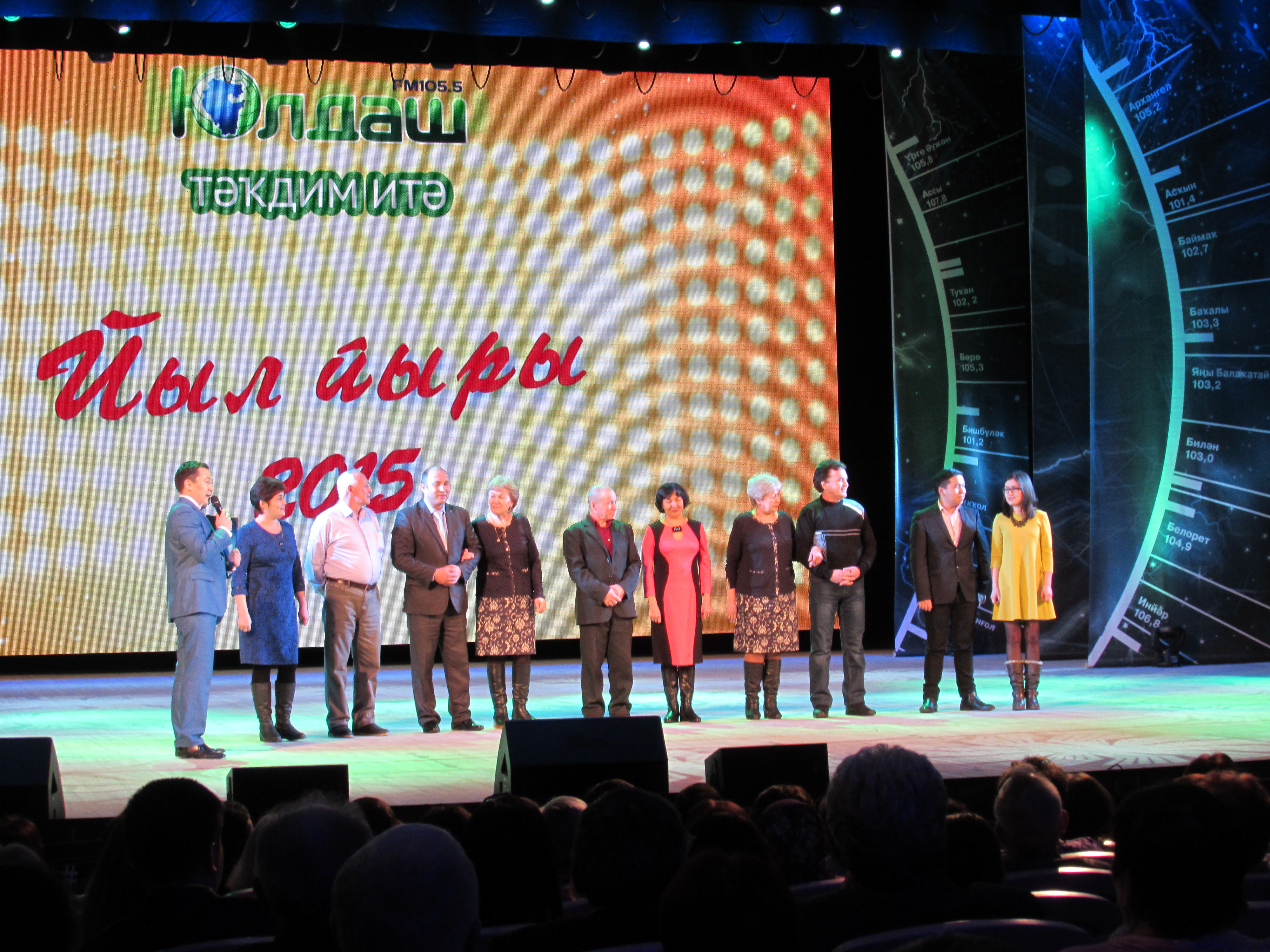 Концерт "Песня года - 2015", Радио "Юлдаш", Уфа, ГКЗ "Башкортостан" Башҡортса: "Йыл йыры 2015" концерты, "Юлдаш" радиоһы, Өфө, "Башҡортостан" ДКЗ